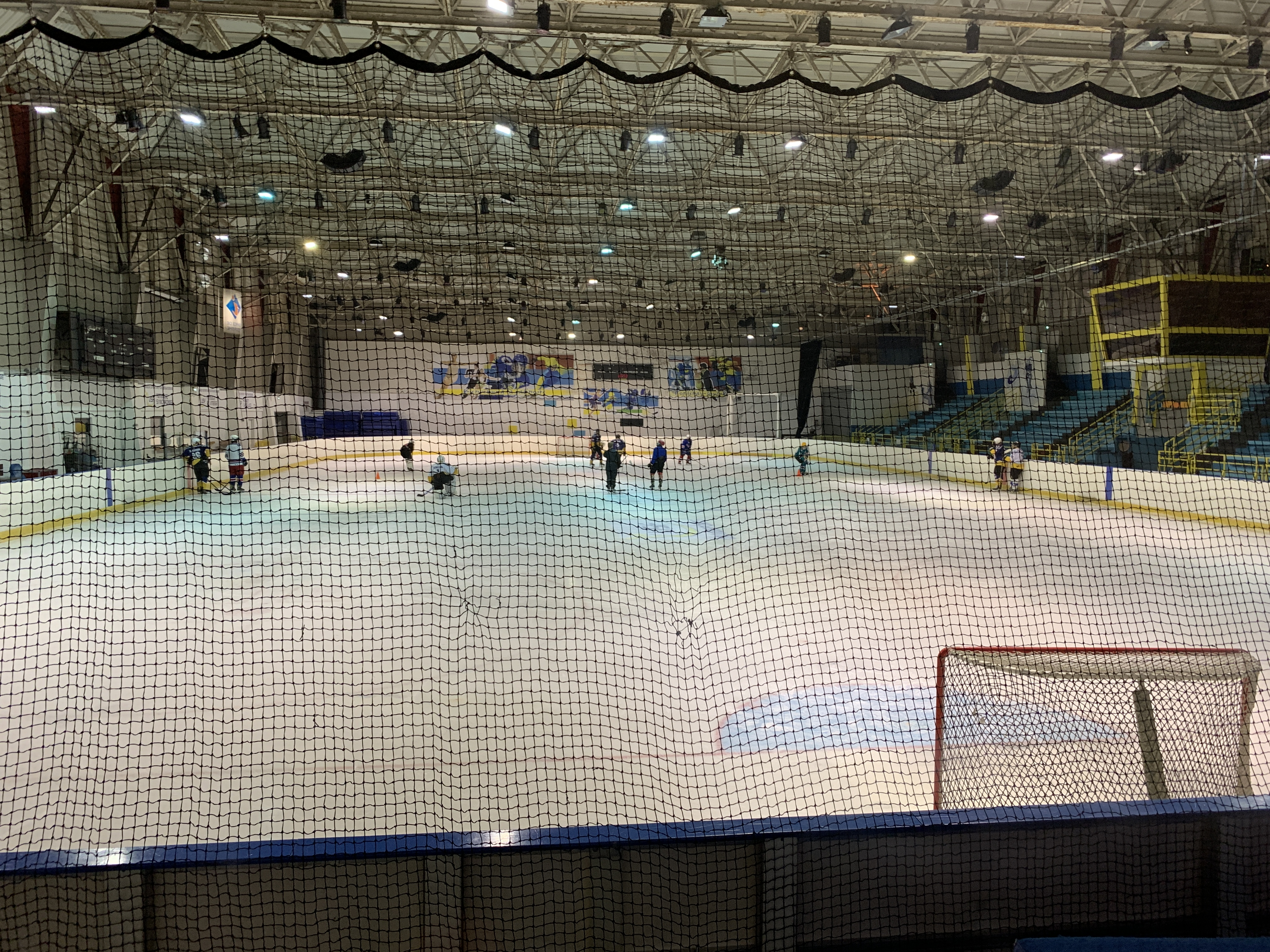 Intérieur de la patinoire Salvador-Allende, Fontenay-sous-Bois.